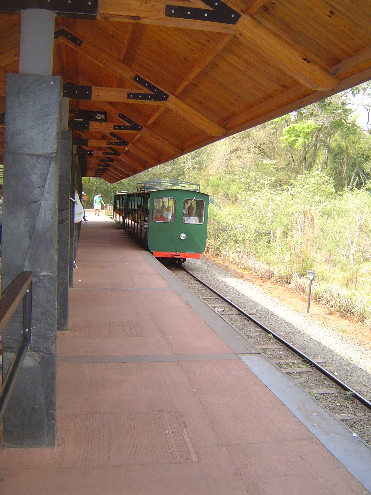 Tren Ecologico de la selva